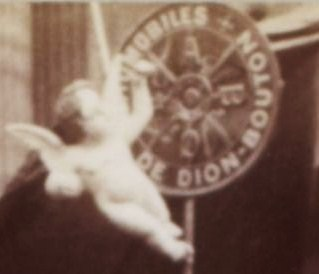 Haut d'un des quatre mâts du char automobile électrique de la Reine des Reines de la rive droite Marie Missiaux devant le siège de l'Automobile club de France place de la Concorde.